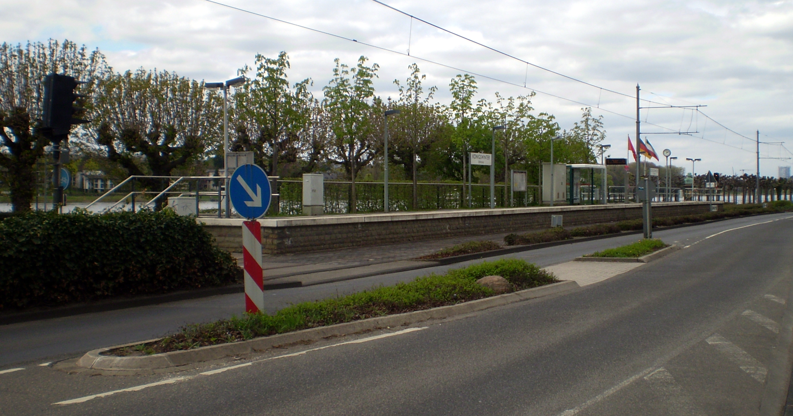 Stadtbahn-Haltestelle Königswinter Denkmal der Siebengebirgsbahn, Königswinter